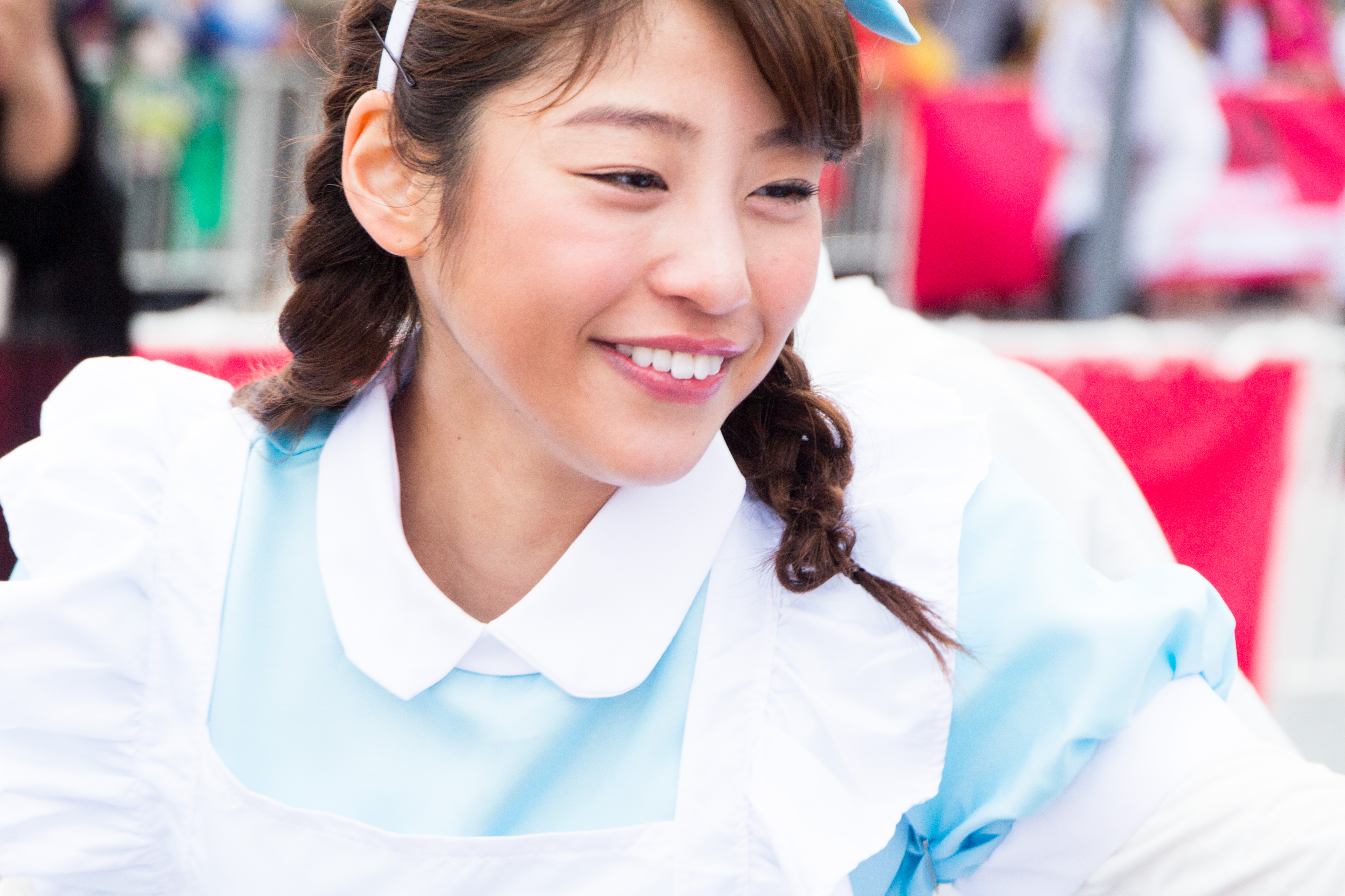 T-SPOOK 2016 岡副麻希